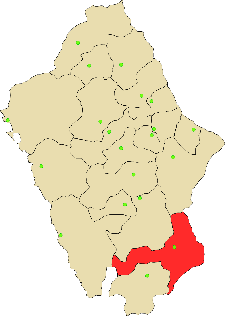 Provincia de Bolognesi de depatamento Ancash